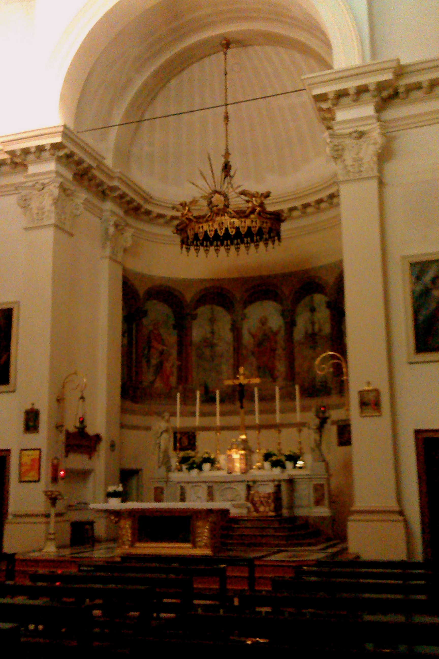 Interno della chiesa di Sant'Andrea a Padova.